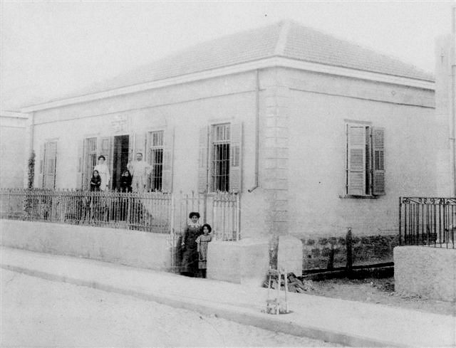 בית יעקב פרלשטיין